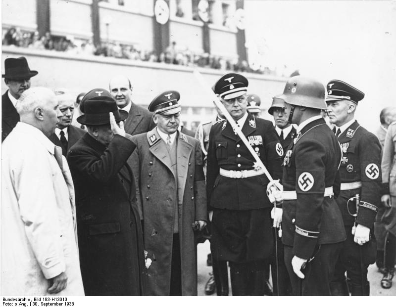 ADN-Zentralbild / Archiv Münchener Abkommen 1938, Abflug des französischen Ministerpräsdienten Daladier aus München am 30.9.1938 Nach der Unterzeichnung des schändlichen Münchener Abkommens wurde Daladier durch die sogenannte "Ehrenkompanie" der verbrecherischen SS-Standarte "Deutschland" verabschiedet. In der Mitte: Daladier, Gauleiter Wagner und SS Obergruppenführer Freiherr v. Eberstein, der Polizeipräsident von München. [Scherl Bilderdienst]